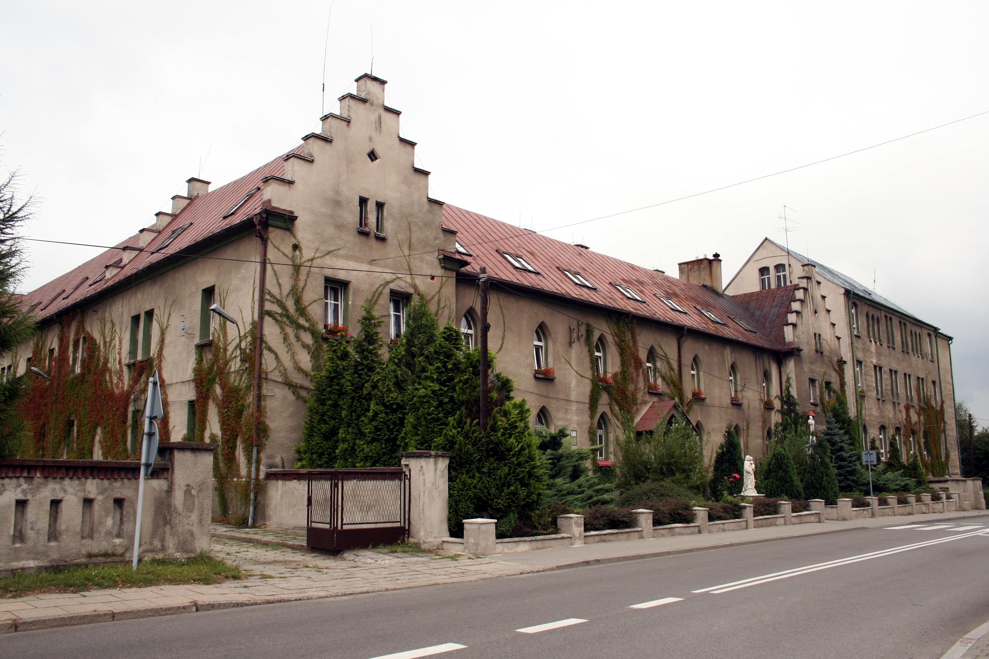 Dom Pomocy Społecznej w Lyskach, powiat rybnicki